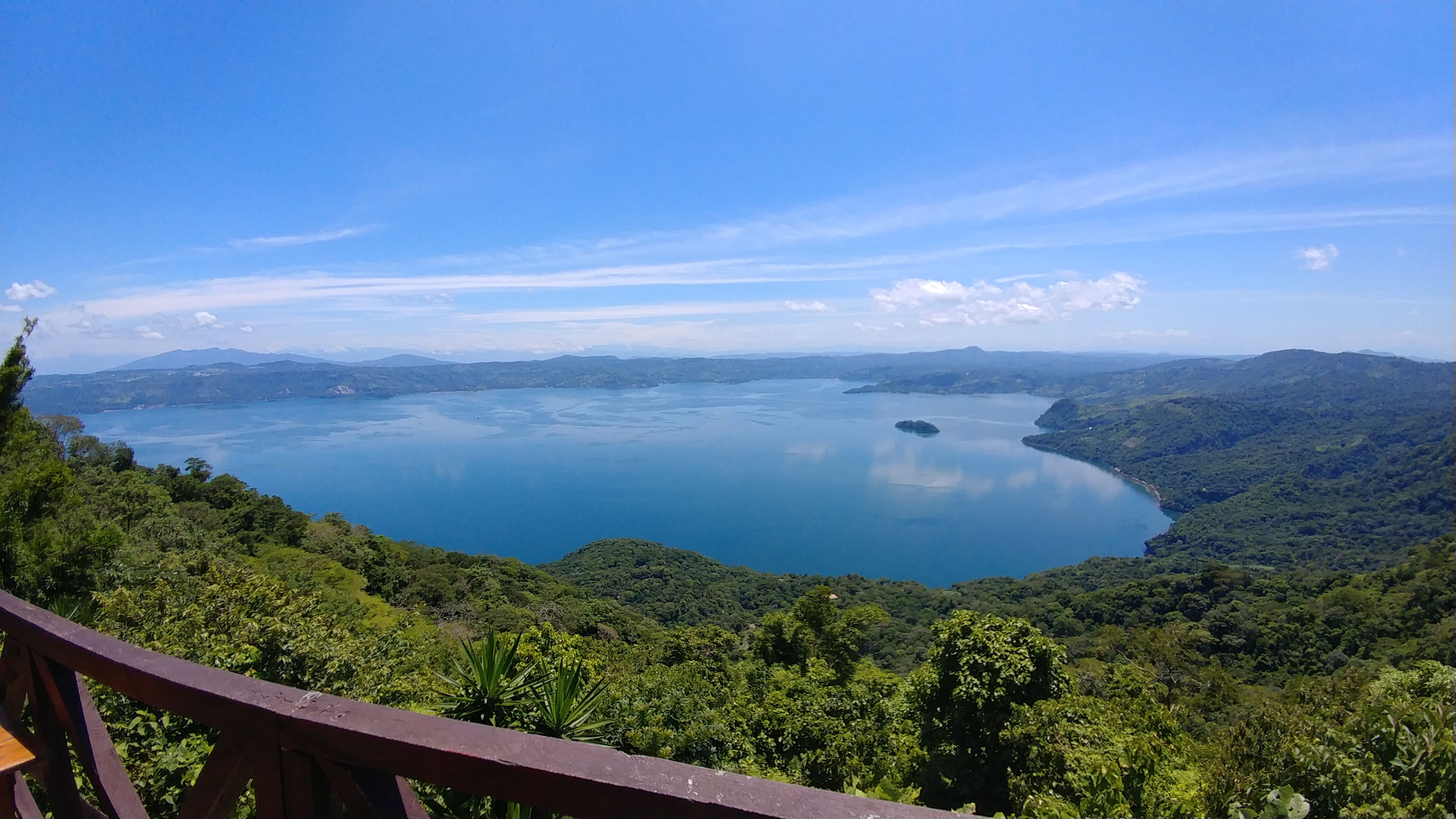 Vista de la caldera de ilopango desde la carretera panoramica.